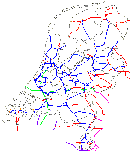 elektrificatiekaart van Nederland, eigen werk Spoorlijn